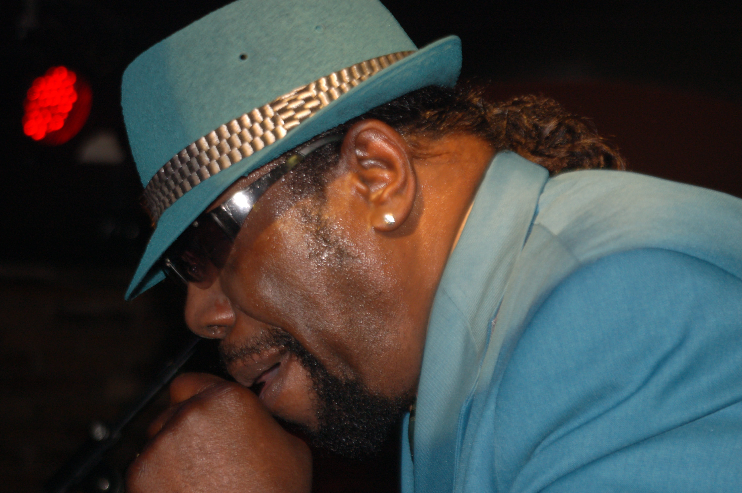 „Mr. Symarip“ bei einem Konzert im Klub-Ost, Wien